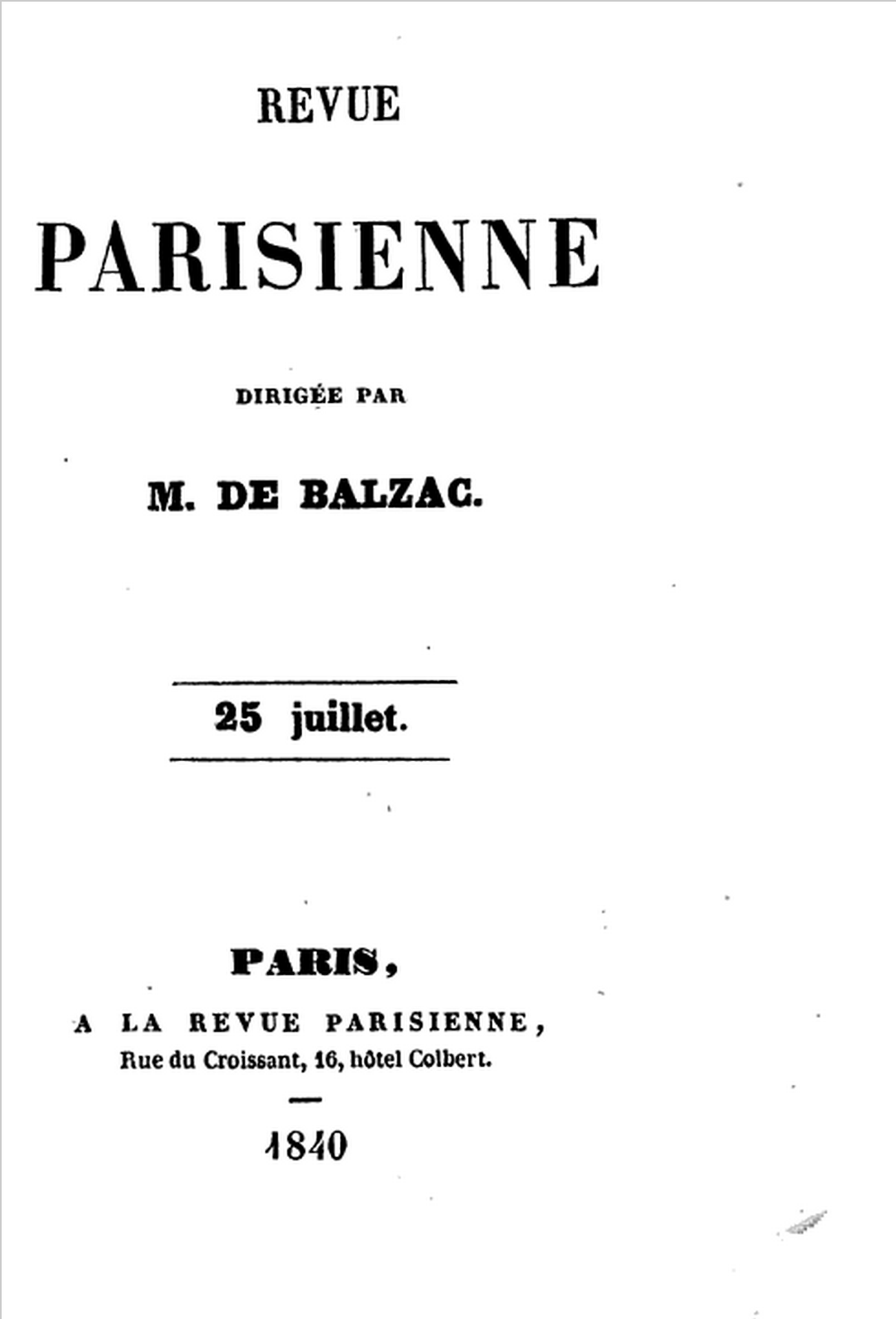 Couverture de la Revue parisienne